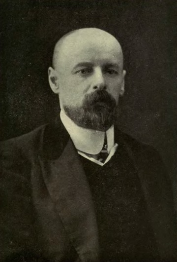 El político ultraconservador ruso Vladimir Purishkevich.